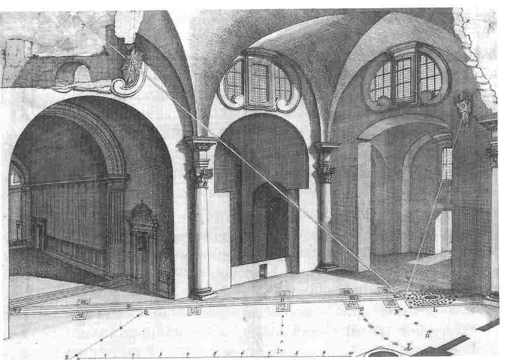 Diagram of meridiana in Santa Maria degli Angeli, Rome. From Bianchini, De nummo (1703).